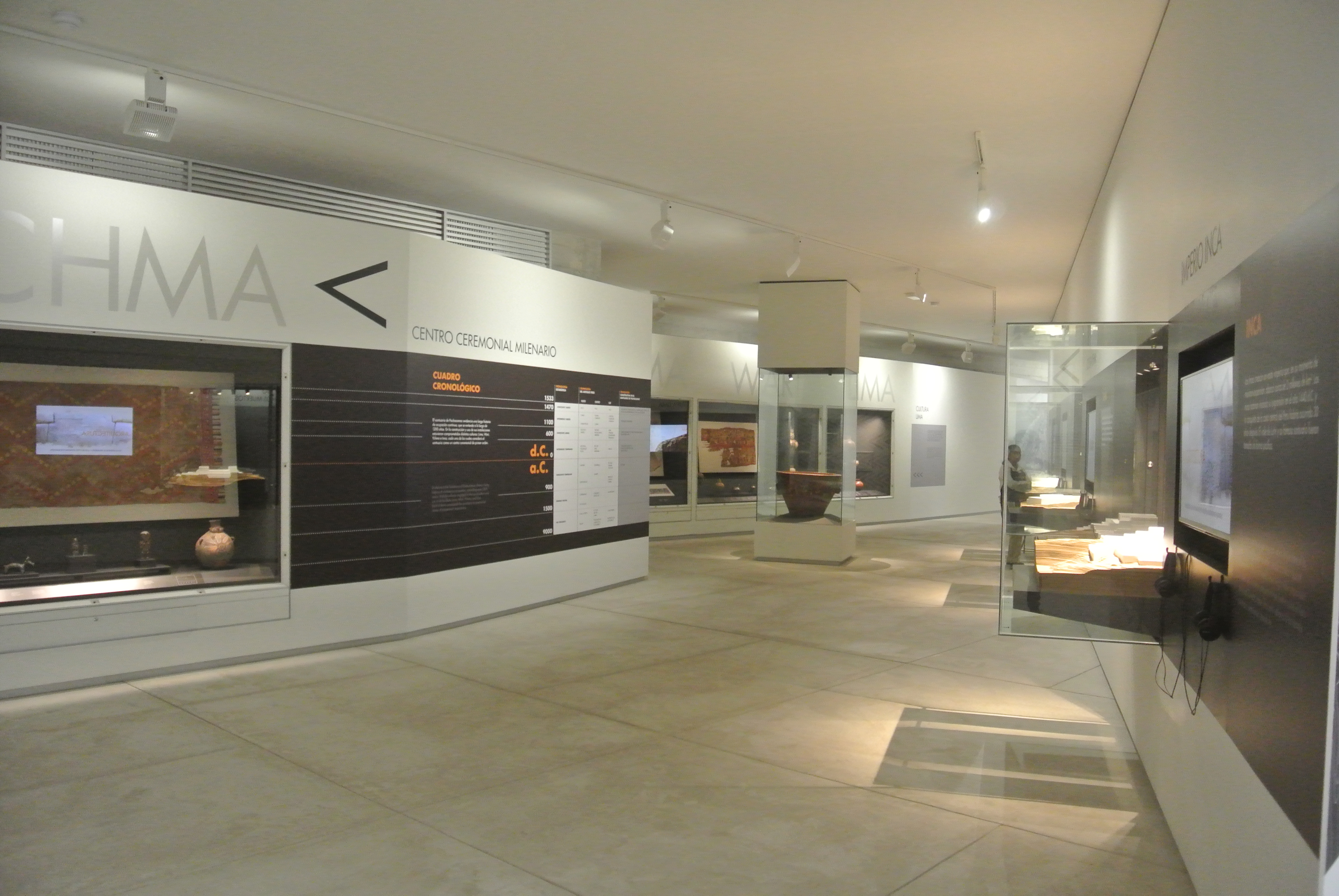 Sala de exposición permanente del Museo de sitio Pachacamac